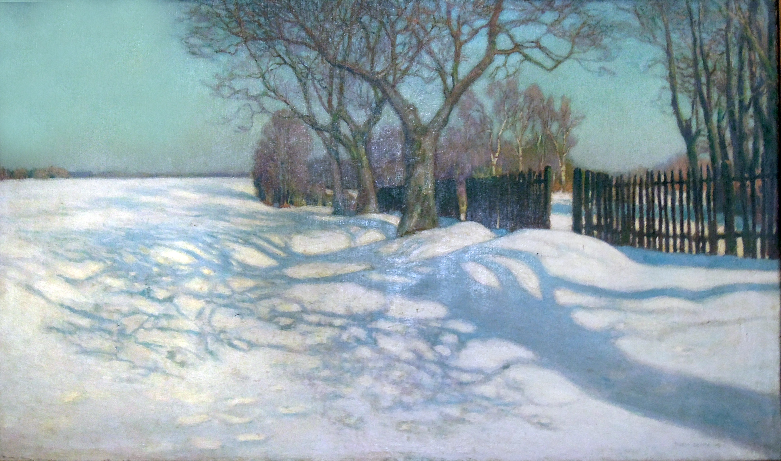 Szron